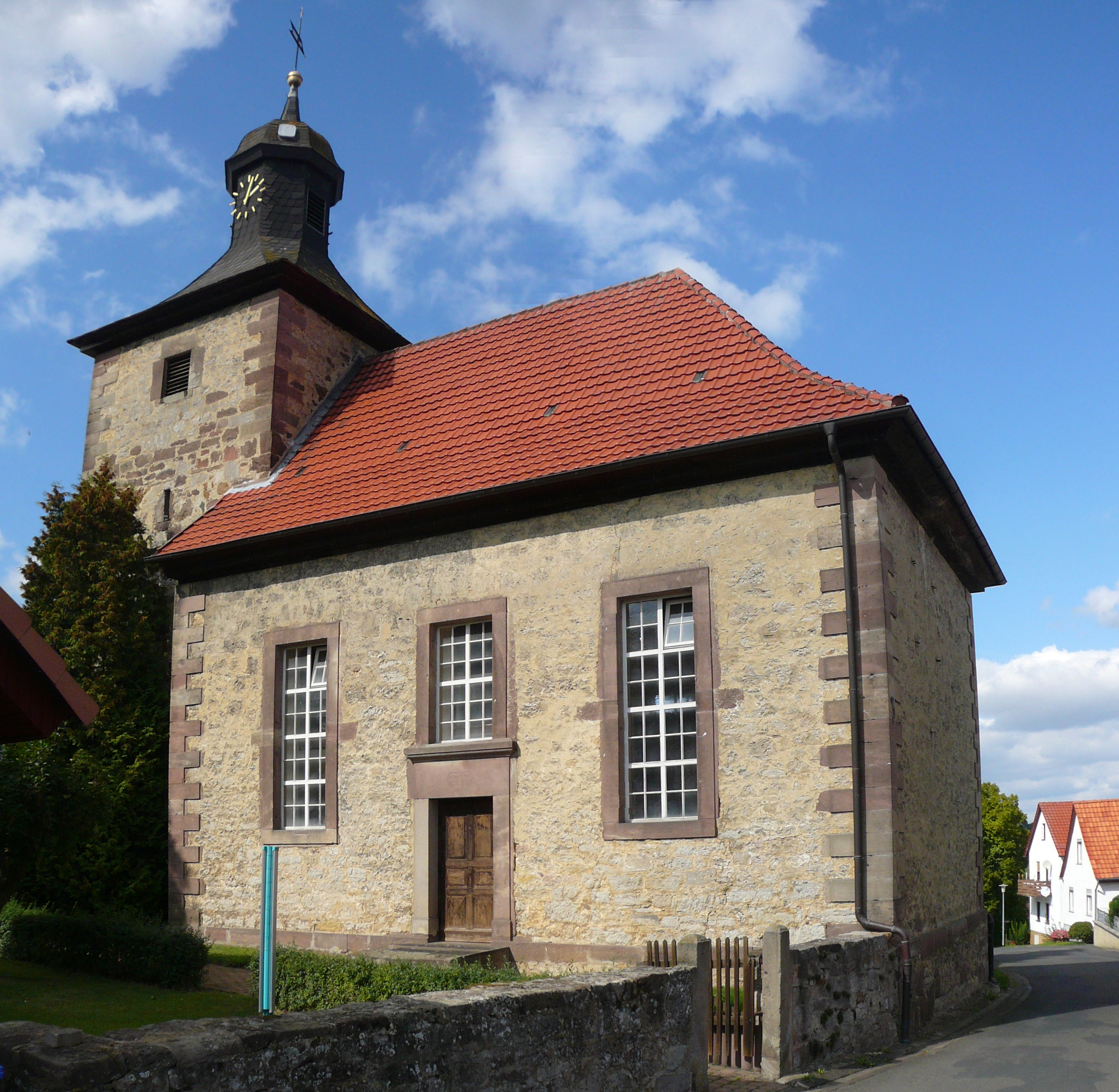 Ev.-luth. Kirche St. Petri in Atzenhausen, Gemeinde Rosdorf, Niedersachsen. Turm mittelalterlich, Saalbau errichtet 1821–22